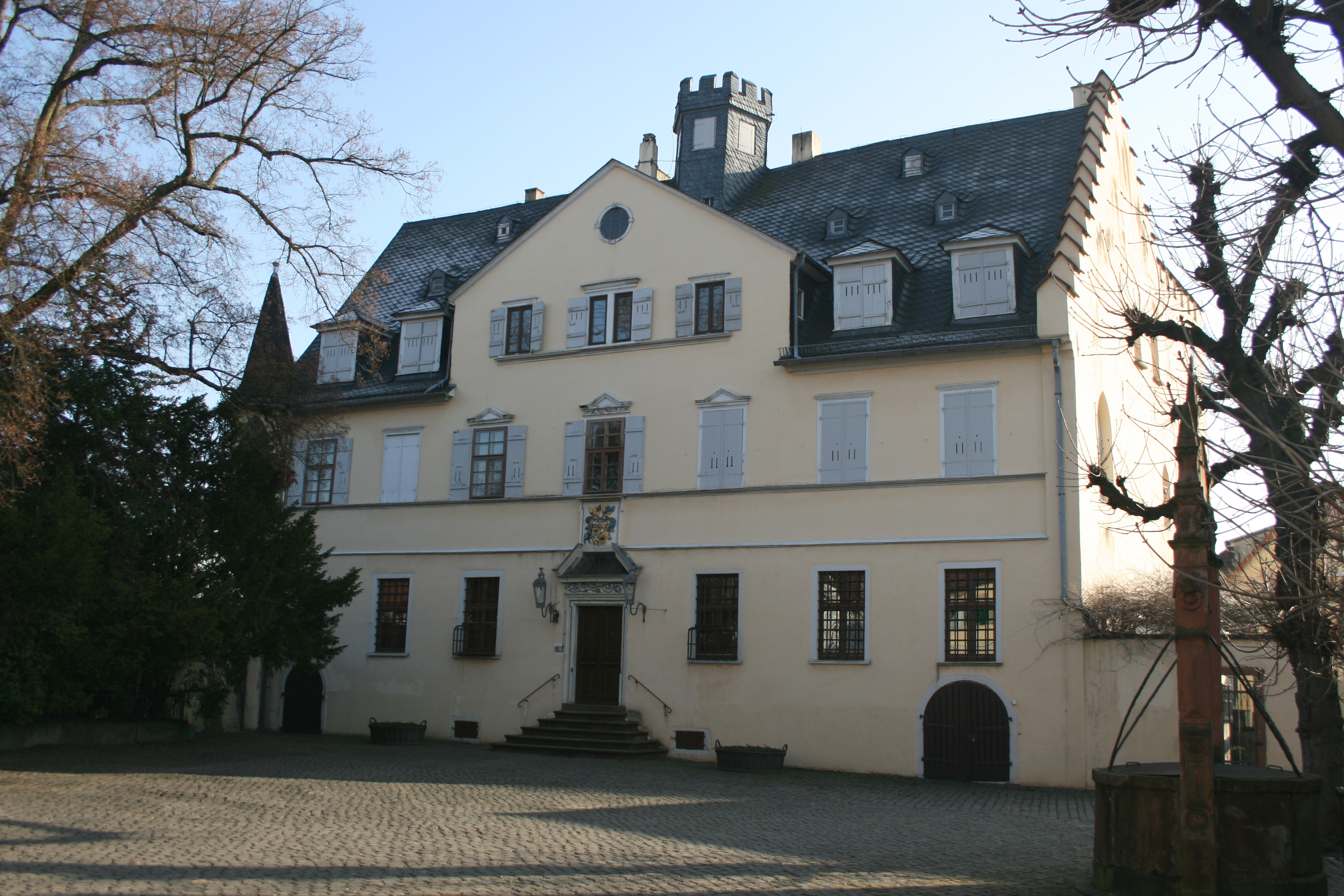 Leonhardisches Schloss in Groß-Karben, Herrenhaus, Hofseite.